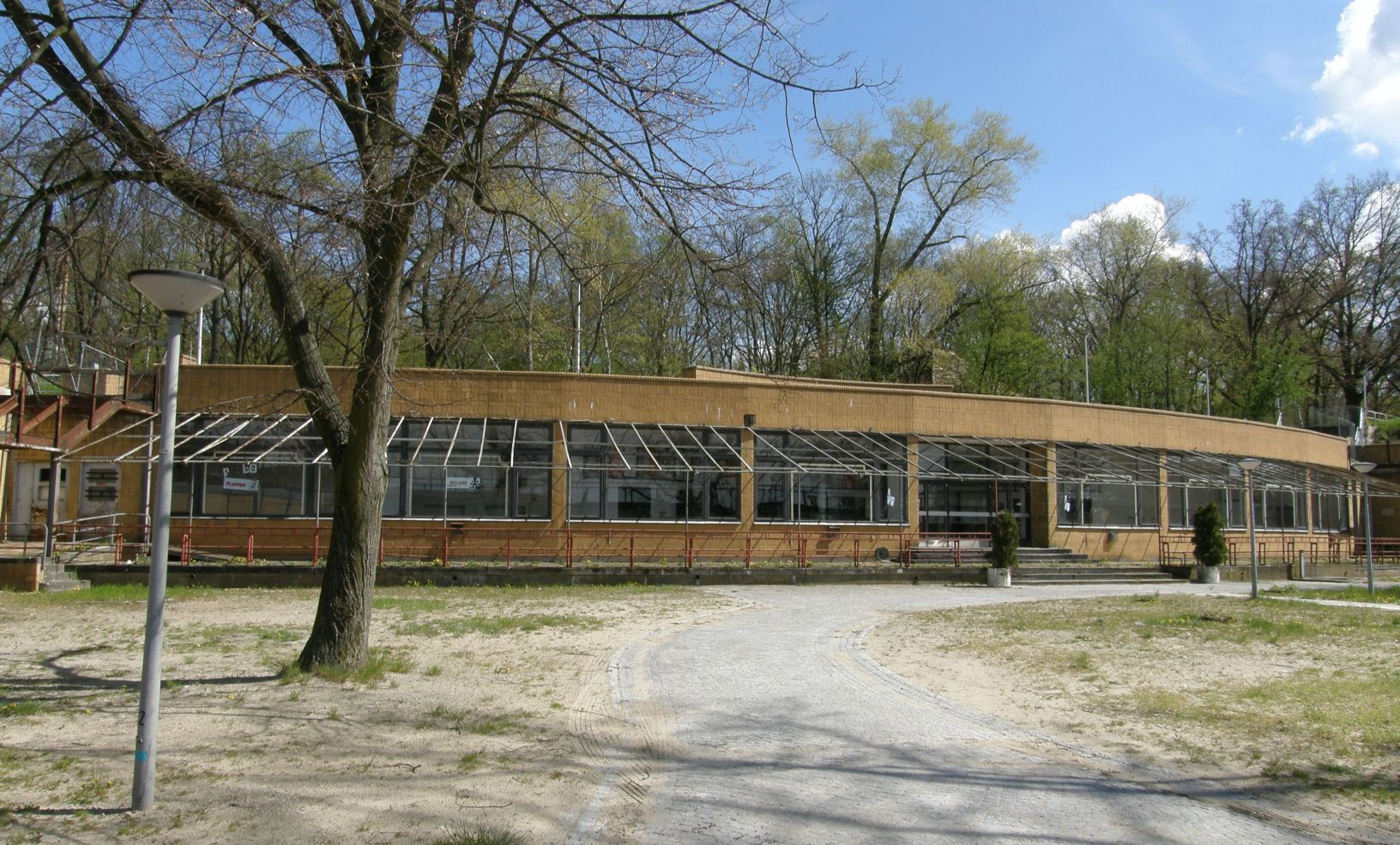 Strandbad Wannsee, Wannseebadweg, Berlin-Nikolassee